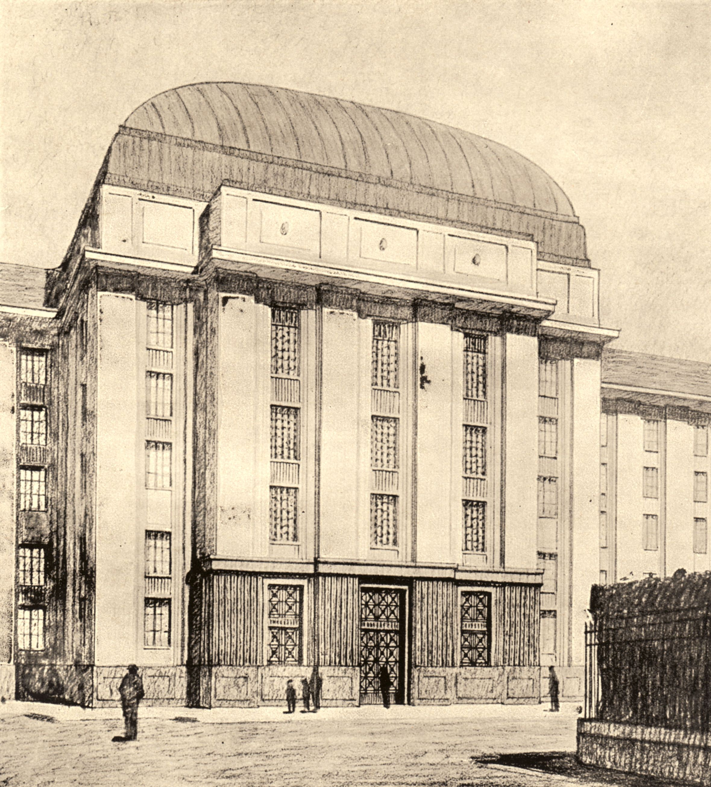 Genf - Wettbewerb naturhistorisches Museum 1912 - Haupteingang, Projekt Maurice Turrettini/Guillaume Revilliod, 2. Preis